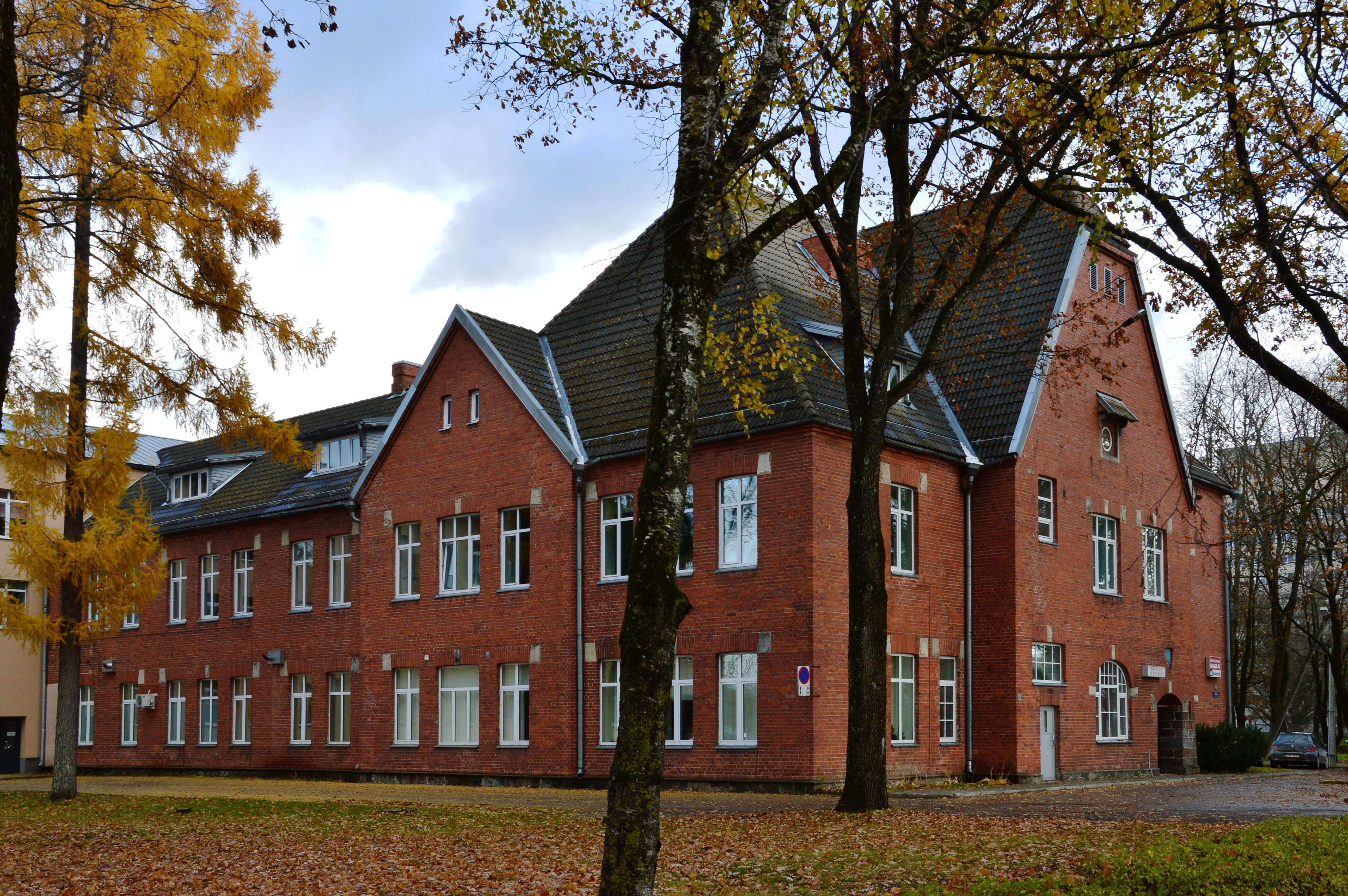 Tänapäeval Järvamaa haigla hoone.